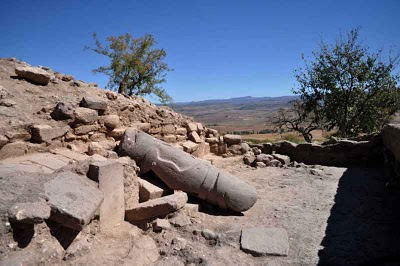 Restos de el centro arqueologico de El Teul en Zacatecas